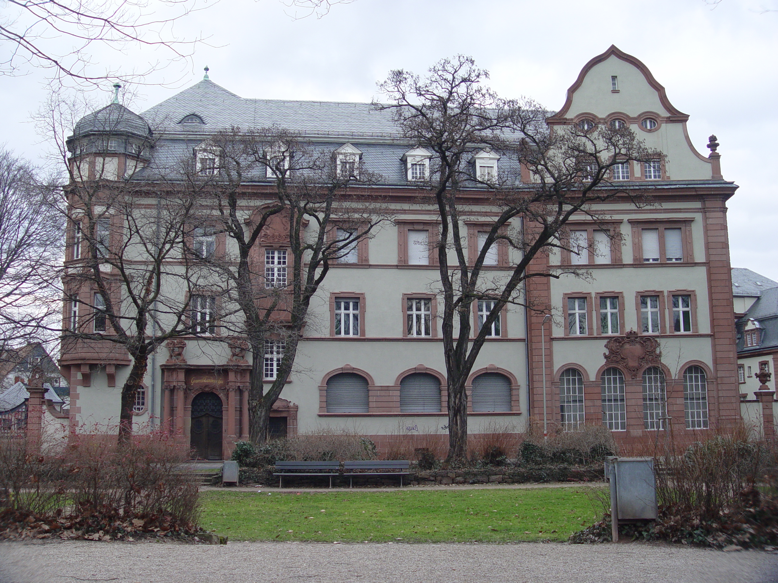 Bild: Generallandesarchiv Karlsruhe Gemeinfrei, fotografiert von Martin Dürrschnabel Kamera: Sony DSC-F717 Uploaded on de-WP: 21:30, 22. Jan 2005 Benutzer:Martin-D1